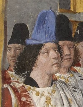 Un chevalier de l'ordre de Saint-Michel, peut-être Charles de France (1446-1472), frère du roi Louis XI. Détail de l'enluminure en frontispice des Statuts de l'ordre de Saint-Michel, exemplaire destiné à Louis XI.